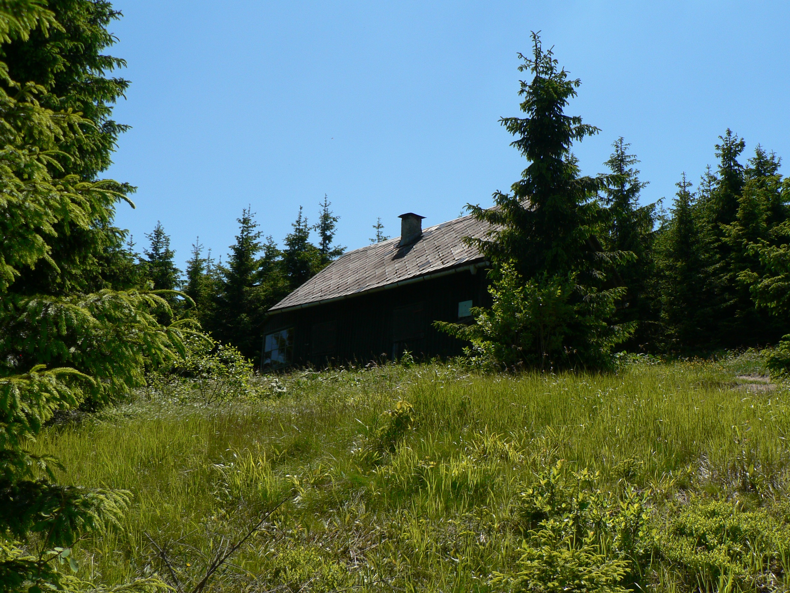 Tetřeví chata na Mravenečníku, Hrubý Jeseník.